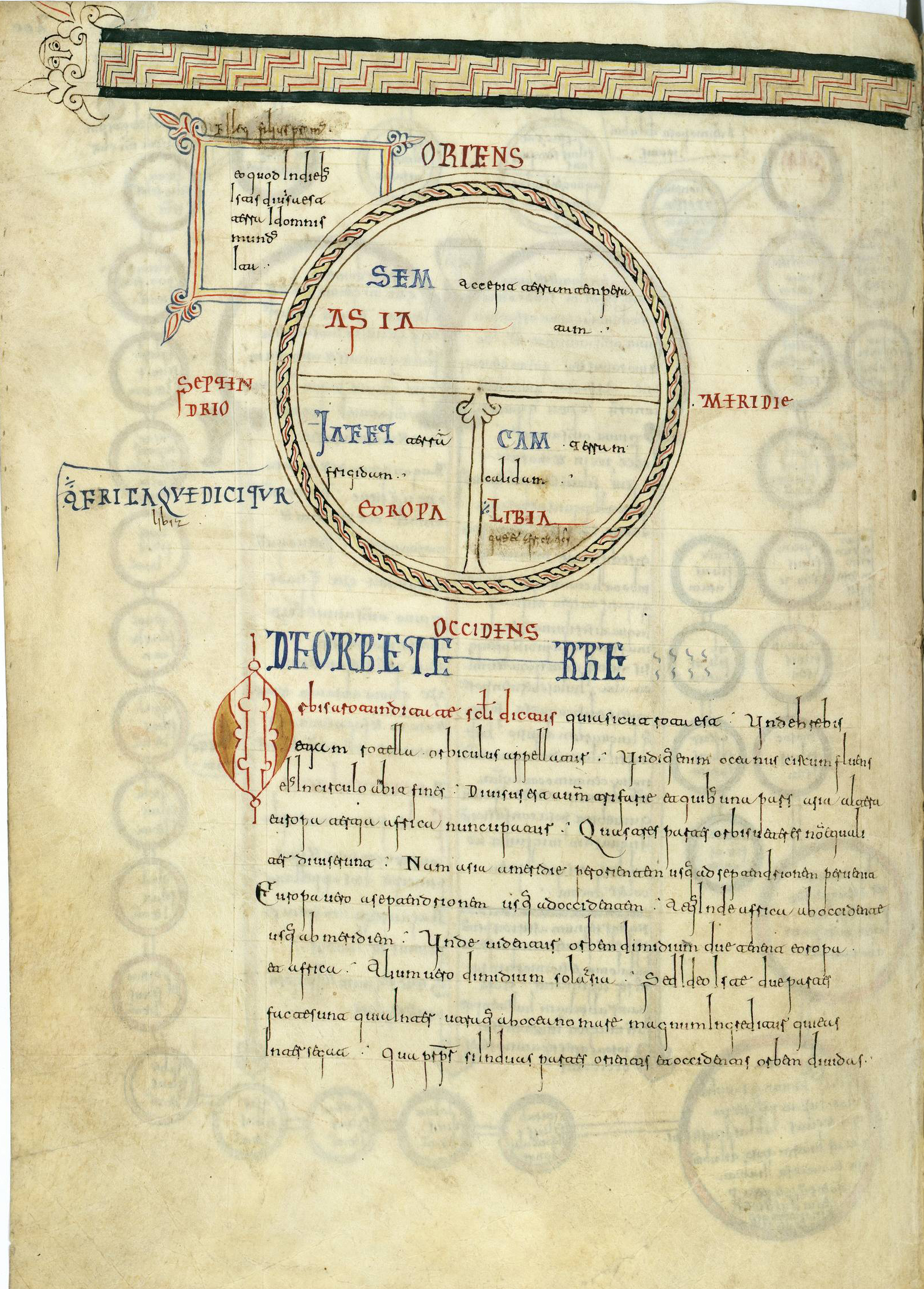 Mapamundi del folio 200 vuelto del Códice de Roda, conservado en la Real Academia de la Historia (España), siglo X-XI, 232 folios (29 x 21 cm) en pergamino. Escritura visigótica.